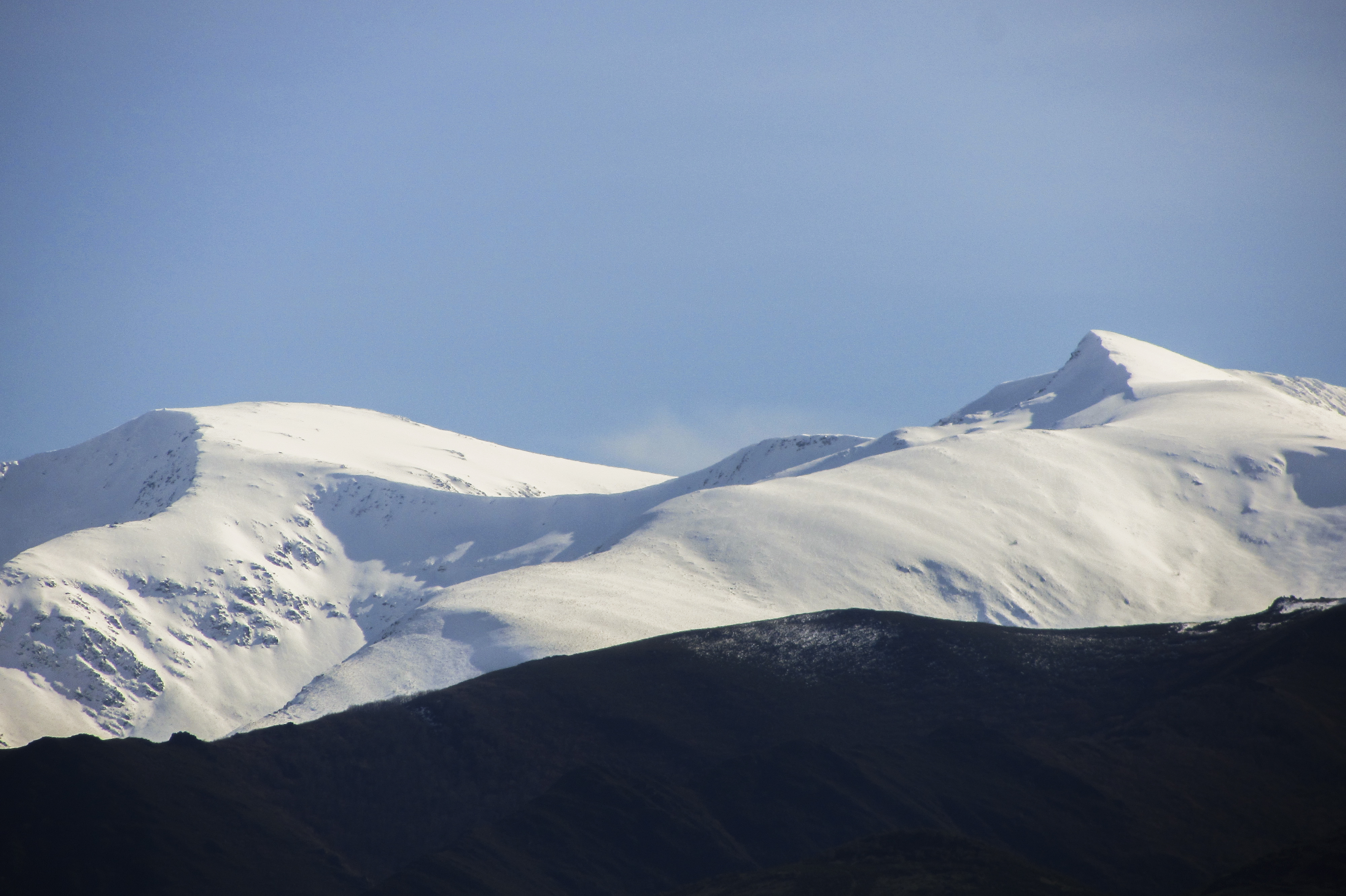 Aquilianos invernales